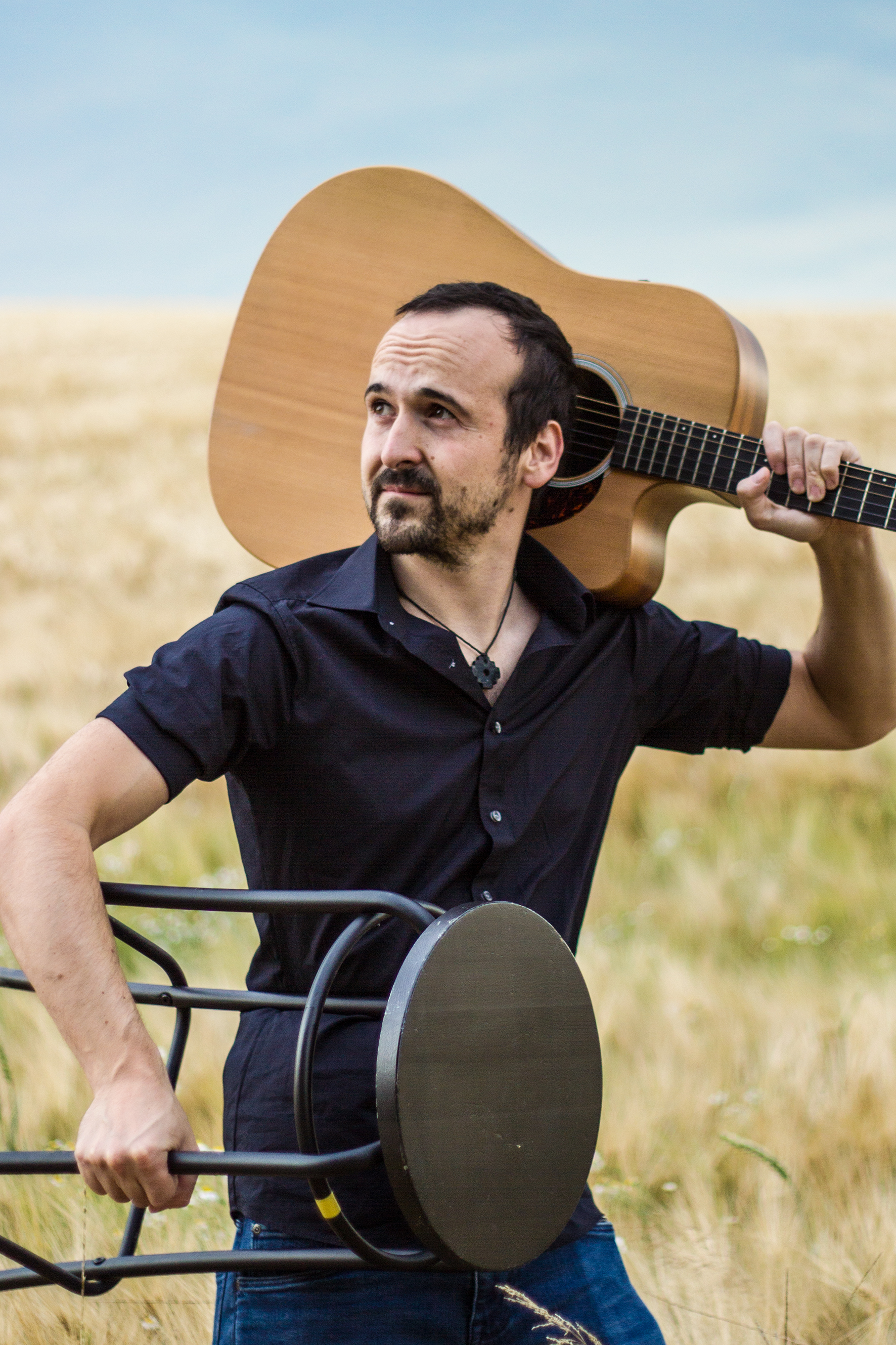 daBERRER